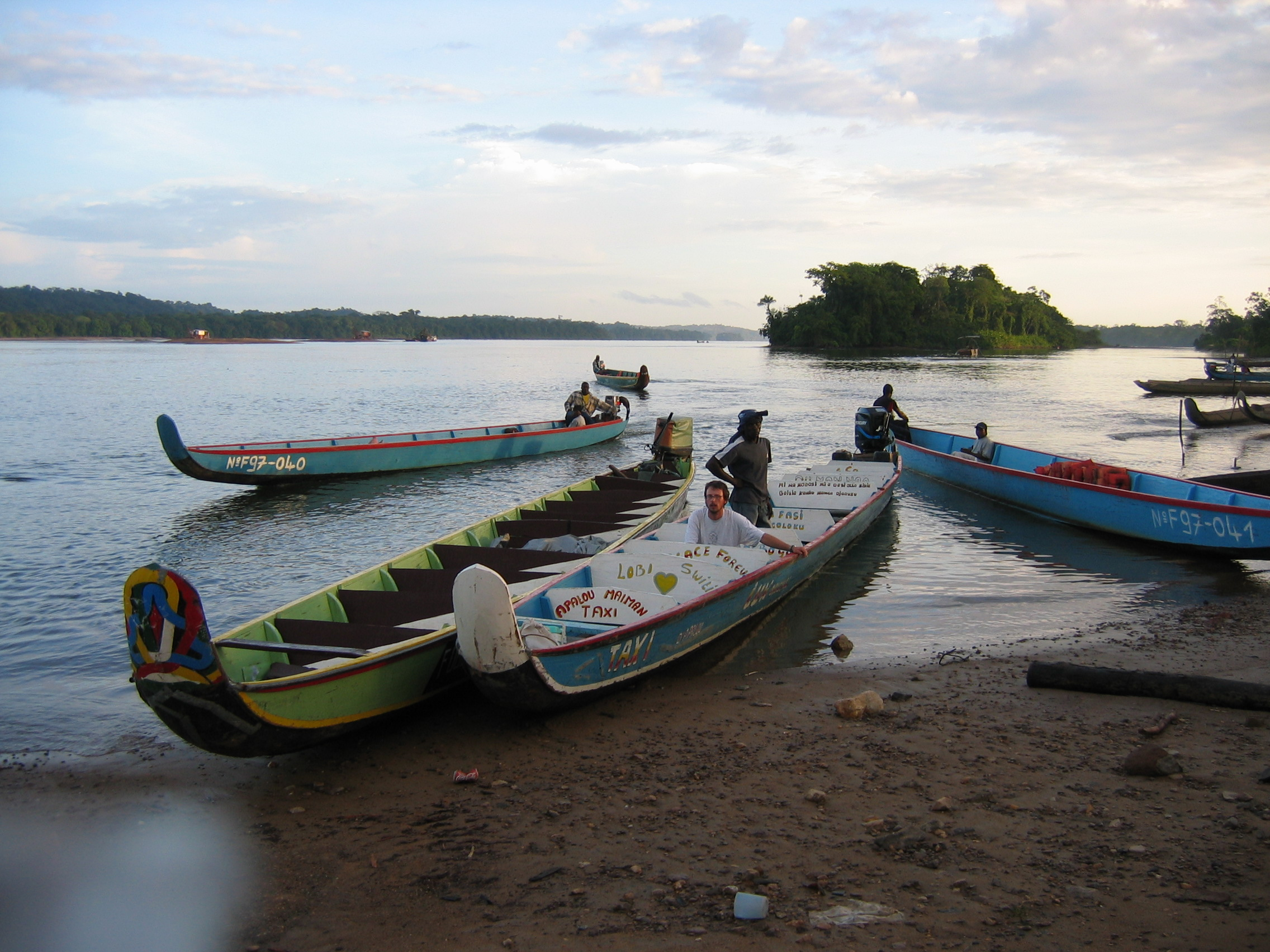 Pirogues Taxis à Apatou (Guyane Française)